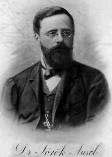 Dr. Török Aurél, (Ponori Thewrewk Aurél orvos) (1842-1912)